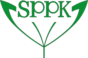 Logo SPPK